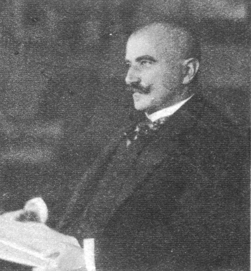 Rubinek Gyula földművelődésügyi miniszter